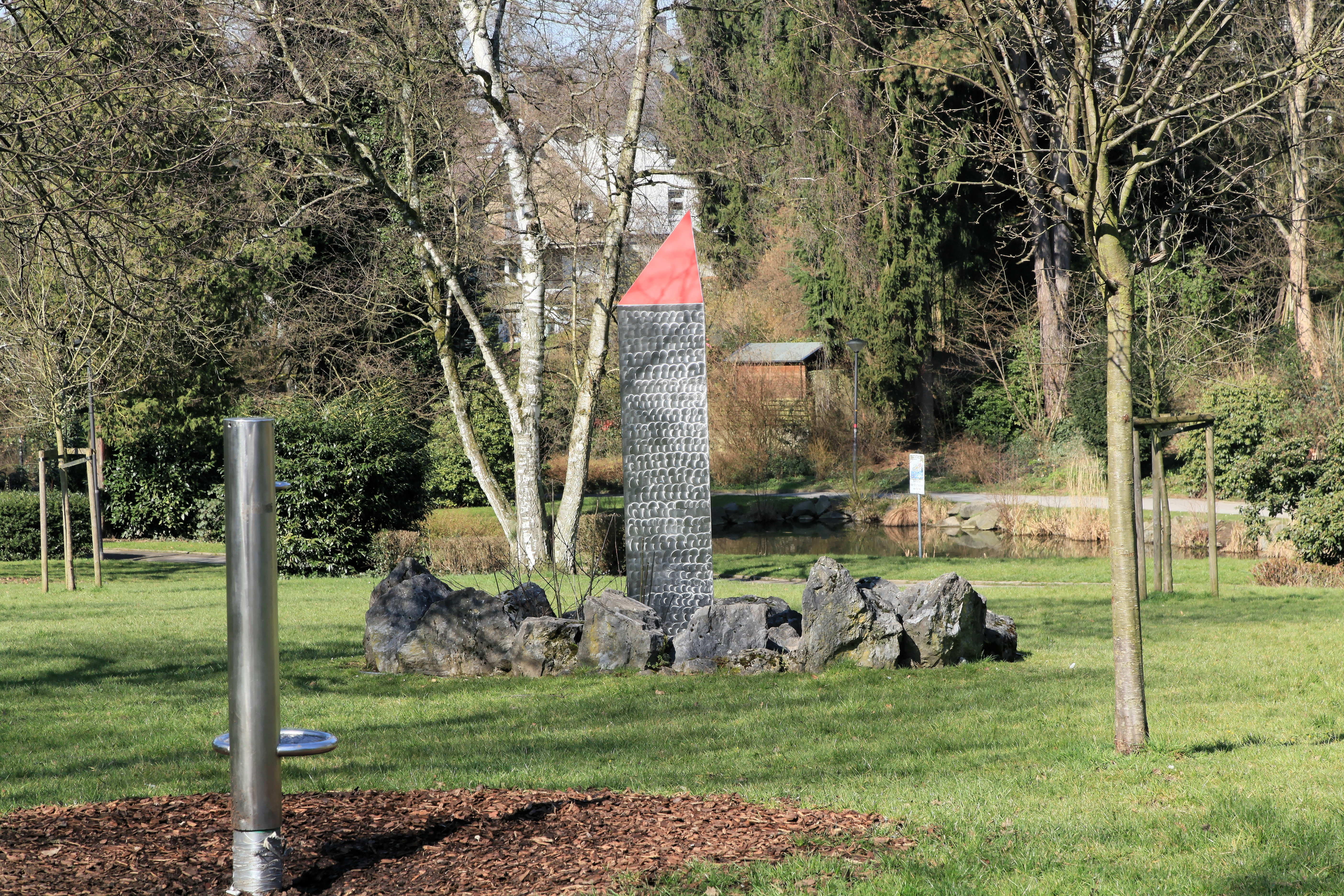 "Steinkreis" von Doris Mademann-Meise im Schillerpark in Haan